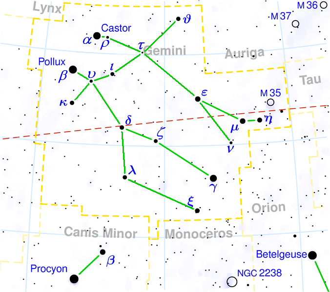 Zvýraznění postav blíženců v souhvězdí Gemini původní soubor na anglické Wiki: Gemini_constellation_map_visualization.png